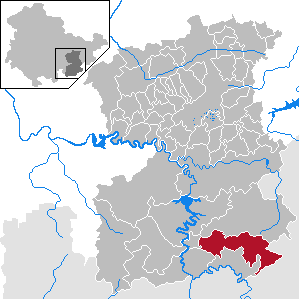 Gefell in Thuringia - Saale-Orla-Kreis